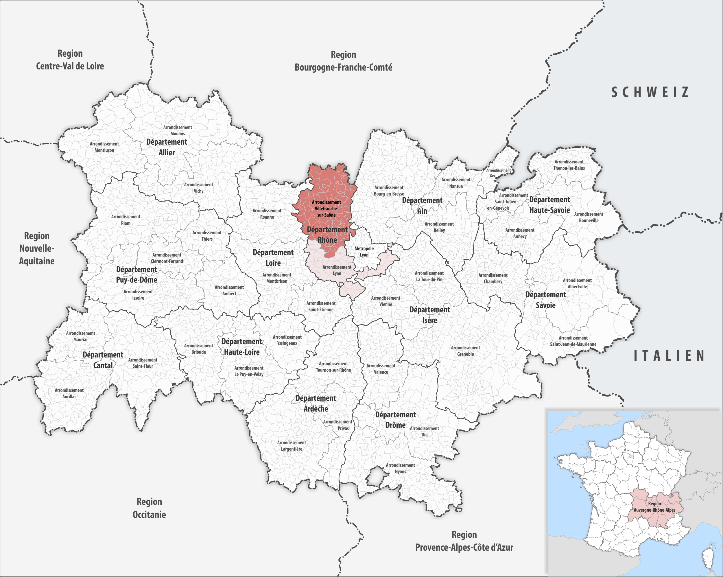 Lage des Arrondissements Villefranche-sur-Saône